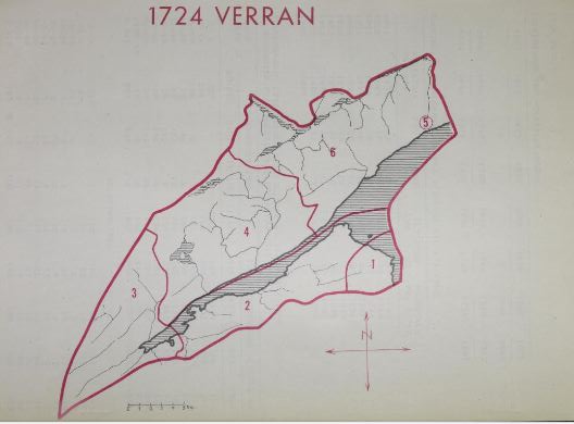 Kart over Verran kommune med dens utstrekning 1901-1963. Tellingskretser ved folketellingen i 1960: 1: Venneshamn, 2: Sørsida/Hovdgrenda, 3: Verrabotn, 4: Verrastranda, 5: Follafoss, 6: Slåttavik